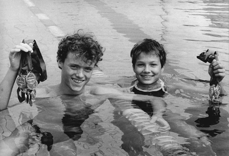 Jörg Hoffmann und Franziska van Almsick mit Medaillen ADN-ZB Oberst 30.7.89 Berlin: XII. Kinder- und Jugendspartakiade Erfolgreichste Spartakiadekämpfer bei den Jungen wurde Jörg Hoffmann (AK 13) mit neun Gold- und drei Silbermedaillen und bei den Mädchen Franziska van Almsick (11 Jahre) mit sieben Goldmedaillen, beide Schwimmer bei Dynamo Berlin. Abgebildete Personen: Almsick, Franziska van: Schwimmerin, Bundesrepublik Deutschland (GND 119114879) Jörg Hoffmann: Schwimmer, DDR